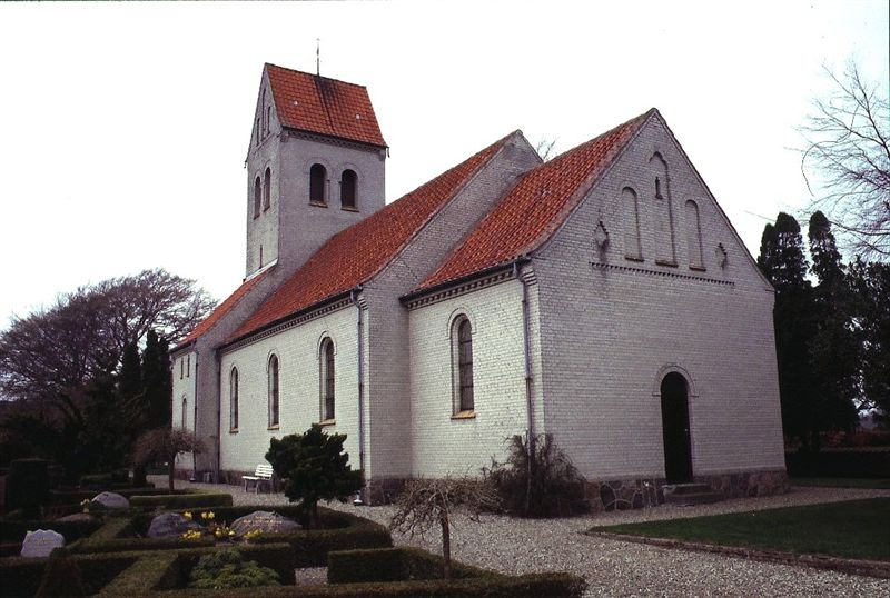 Gerskov Kirke i Danmark. Gerskov kirke